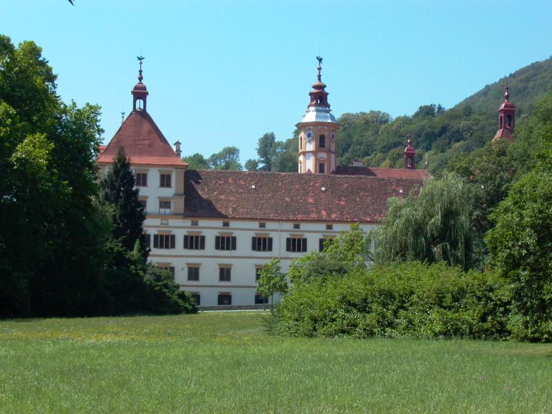 Graz Schloss Eggenberg Seitansicht